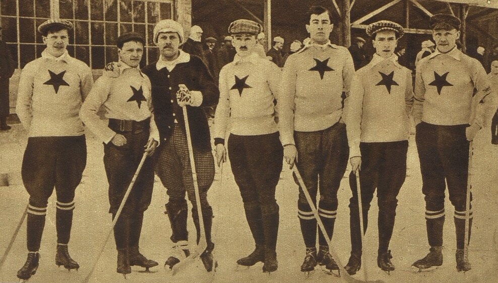 Český tým Chamonix 1909, zleva Vindyš, Hammer, Gruss, Fleischmann, Jarkovský, Palauš, Malý